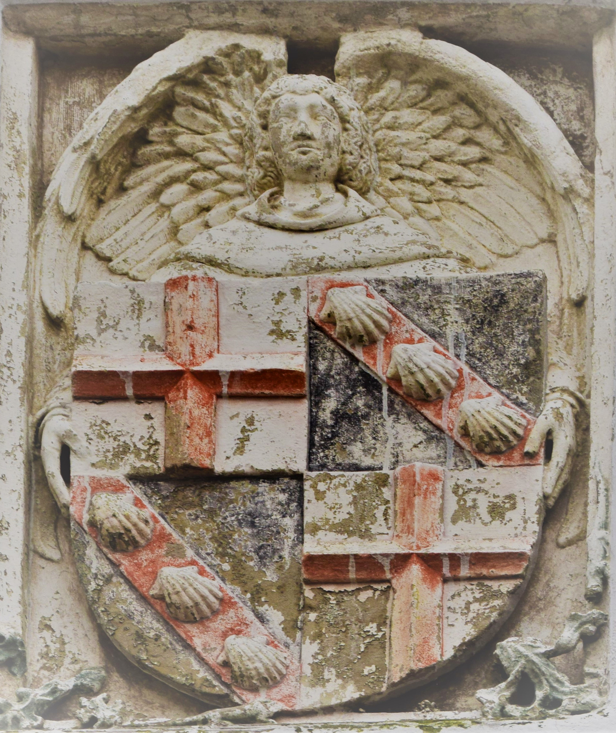 Wappen des Jakob I. von Sierck auf dem Gebäude der ehemaligen Kellerei in Münstermaifeld.